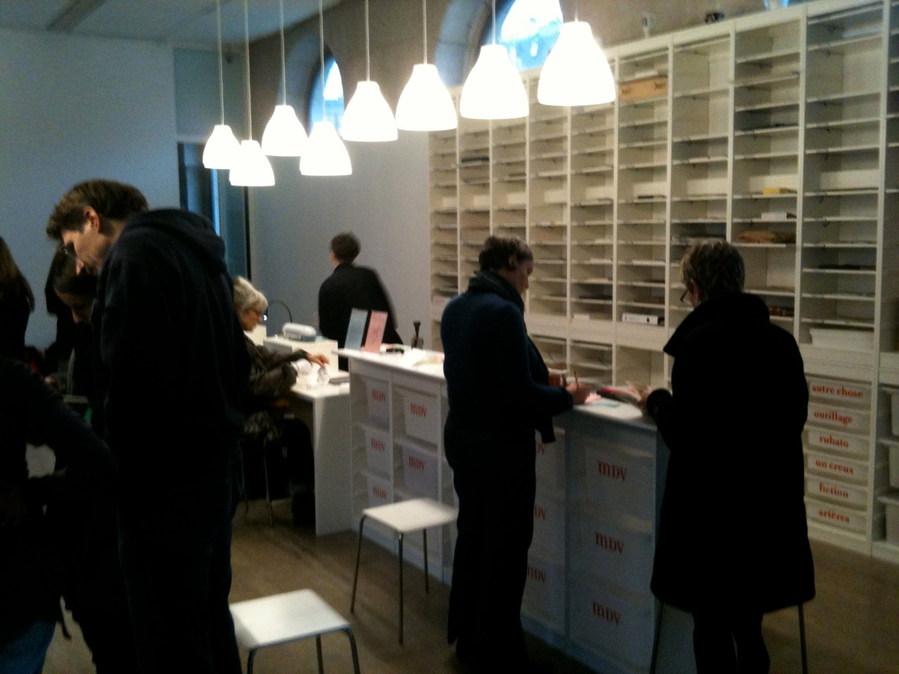 La Bibliothèque Mode de vie à Genève (Halle nord) du 9 octobre au 13 novembre 2010. Consultation.